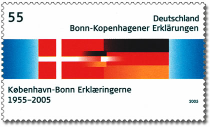 Postwertzeichen der Deutschen Post AG: 50 Jahre Bonn-Kopenhagener Erklärungen